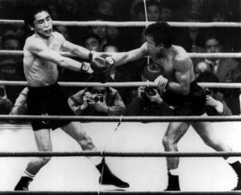 Miguel Canto, otro mexicano del Salón de la Fama del boxeo y que destacó en grandes combates en el peso mosca y con su apodo lo dice todo, El Maestro. En 74 combates ganó 61, nueve derrotas y cuatro empates. Recordado por combates ante el japonés Shoji Oguma a quien venció en Japón, algo de lo más difícil de lograr en esa época.